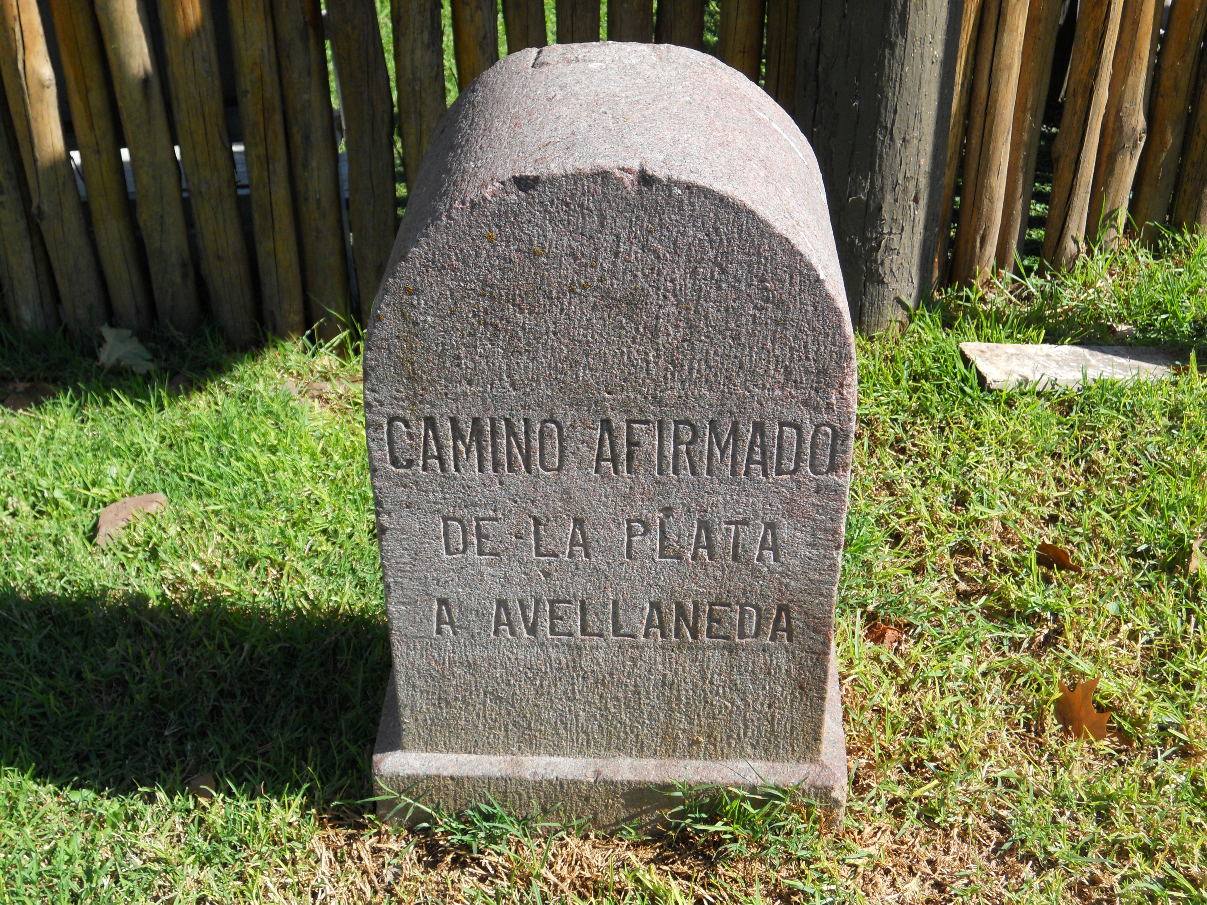 Monolito en el Camino General Belgrano altura calle 505 en Gonnet.